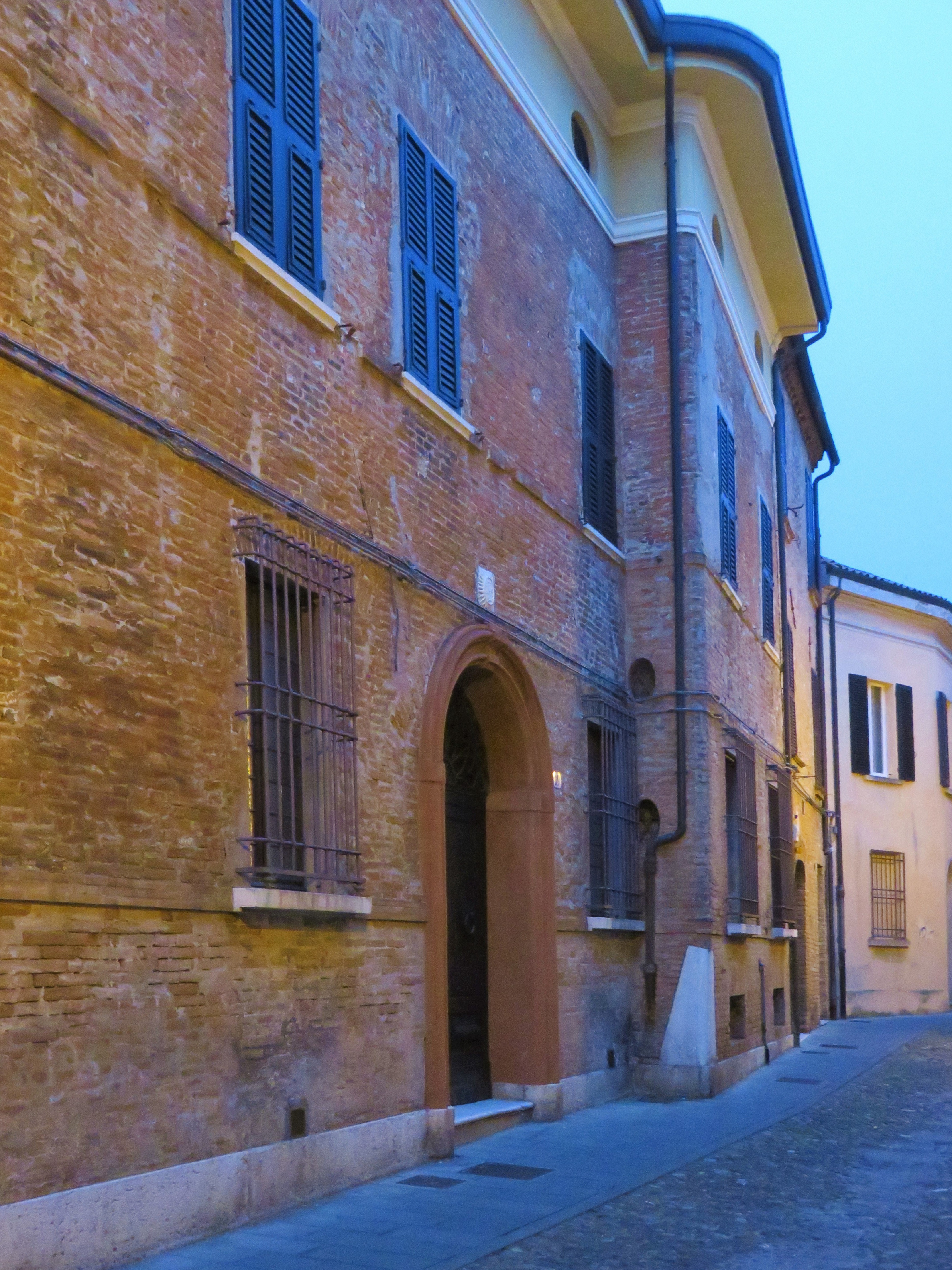 Palazzo in via del Carbone